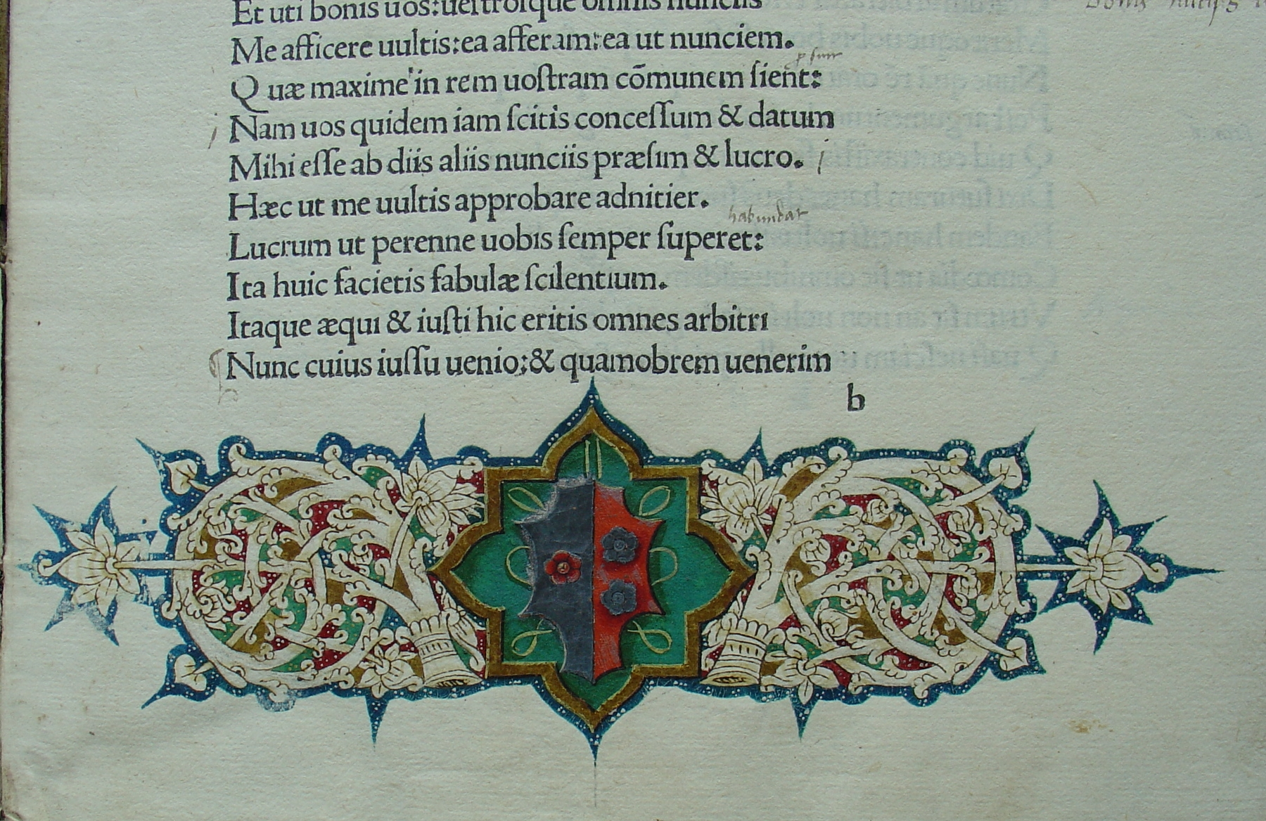 Wappen aus Inkunabel der UB Leipzig: Plautus*, Titus Maccius: Comoediae. Hrsg. von Georgius Merula. Mailand: Ulrich Scinzenzeller, 1. Dezember 1490. 2°. [Inhalt] Widmungsbrief des Hrsg. an Jacobus Zeno, Bischof von Padua – Vita Plauti von Georgius Merula – Plautus: Comoediae – Brief von Eusebius Scutarius an Georgius Merula. ISTC ip00781000. GW M34006. H 13077. BSB-Ink P-574. Bod-inc P-353. Günther 1765. [Einband] Spätgotischer Halbledereinband. Schafleder auf Holz. Italien: Nicht identifizierte Werkstatt. Keine Stempel. Keine Streicheisenlinien. (VD:) /Plautus/, ebenso SV. (SO und SV:) /47/ und /250/. [Zusätze] Auf drei eingebundenen Bl. der im Druck fehlende Text von Amphitrio hsl. ergänzt. Zeitgenössische Merkzeichen und Marginalien, mit Textkorrekturen. [Provenienz] (1) Meißen, Domkapitel. (2) Bibliothek des ehemaligen Hochstifts Meißen in Wurzen. (3) 1860 UBL. Signatur: Poet.lat.2-c